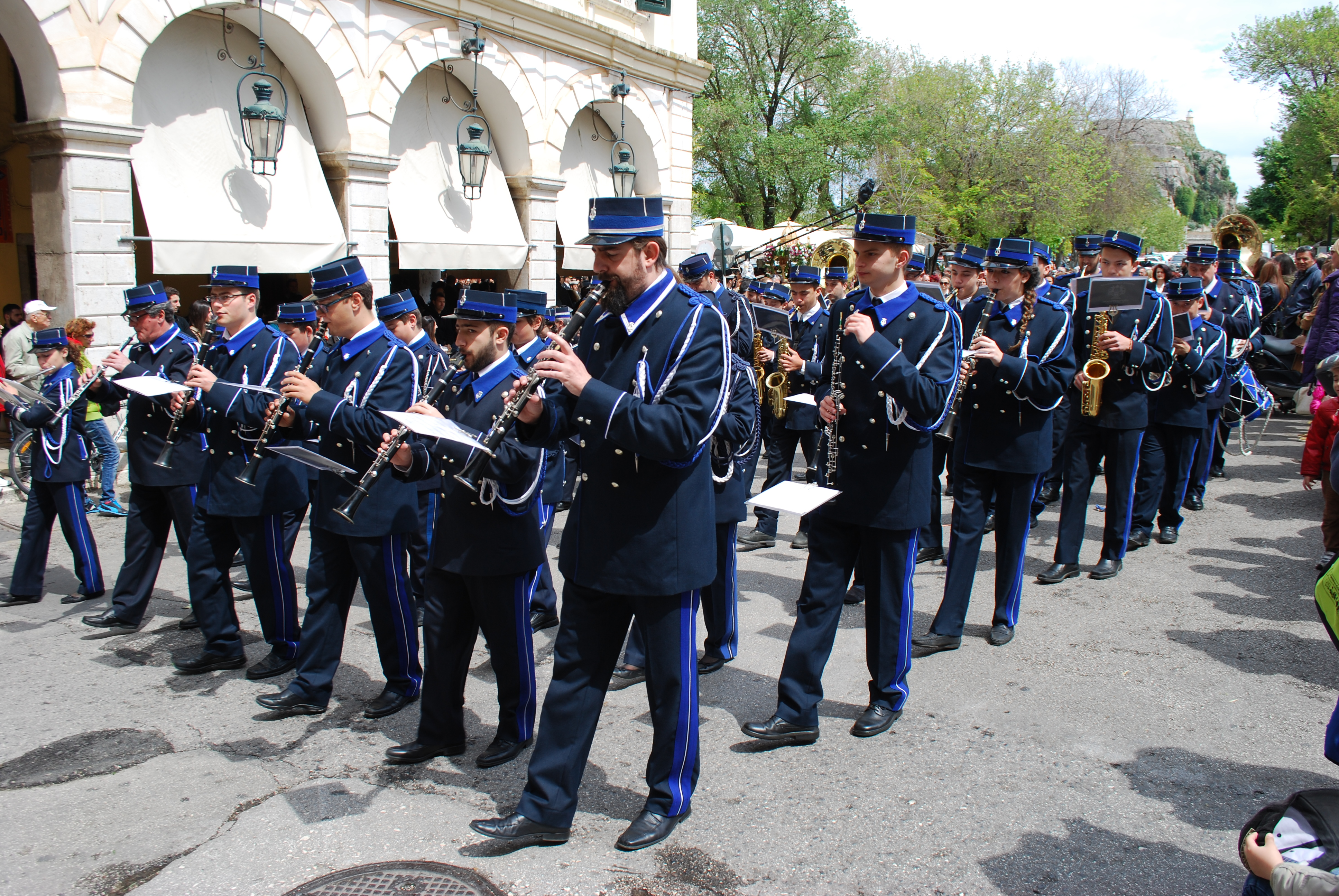 Vue de la ville de Corfou.